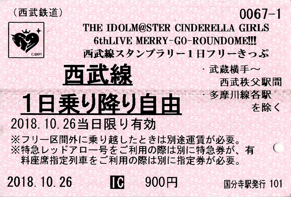 西武鉄道発行 2018年秋西武線スタンプラリー1日フリーきっぷ